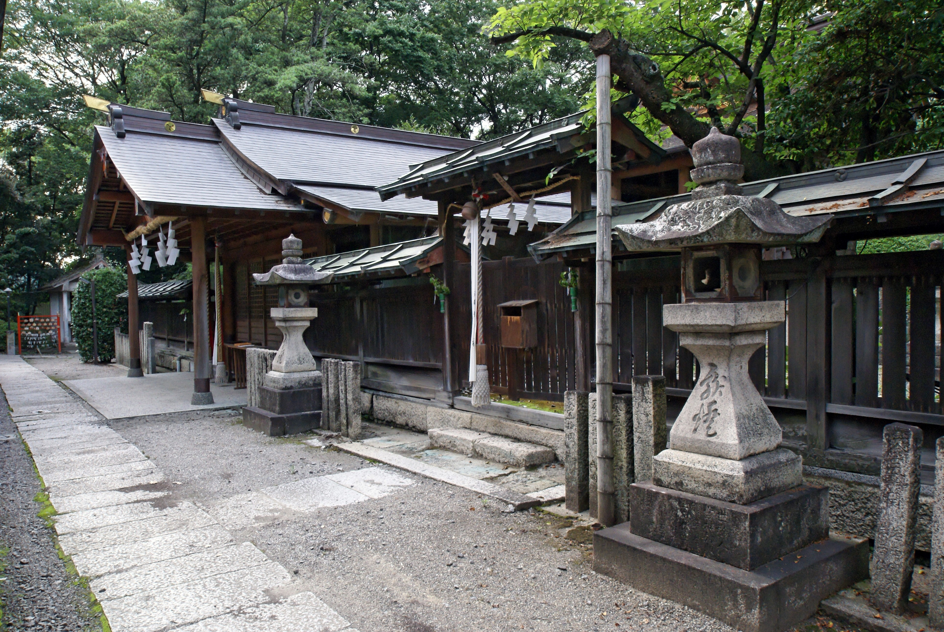 Omiya-jinja in Iwade, Wakayama prefecture, Japan